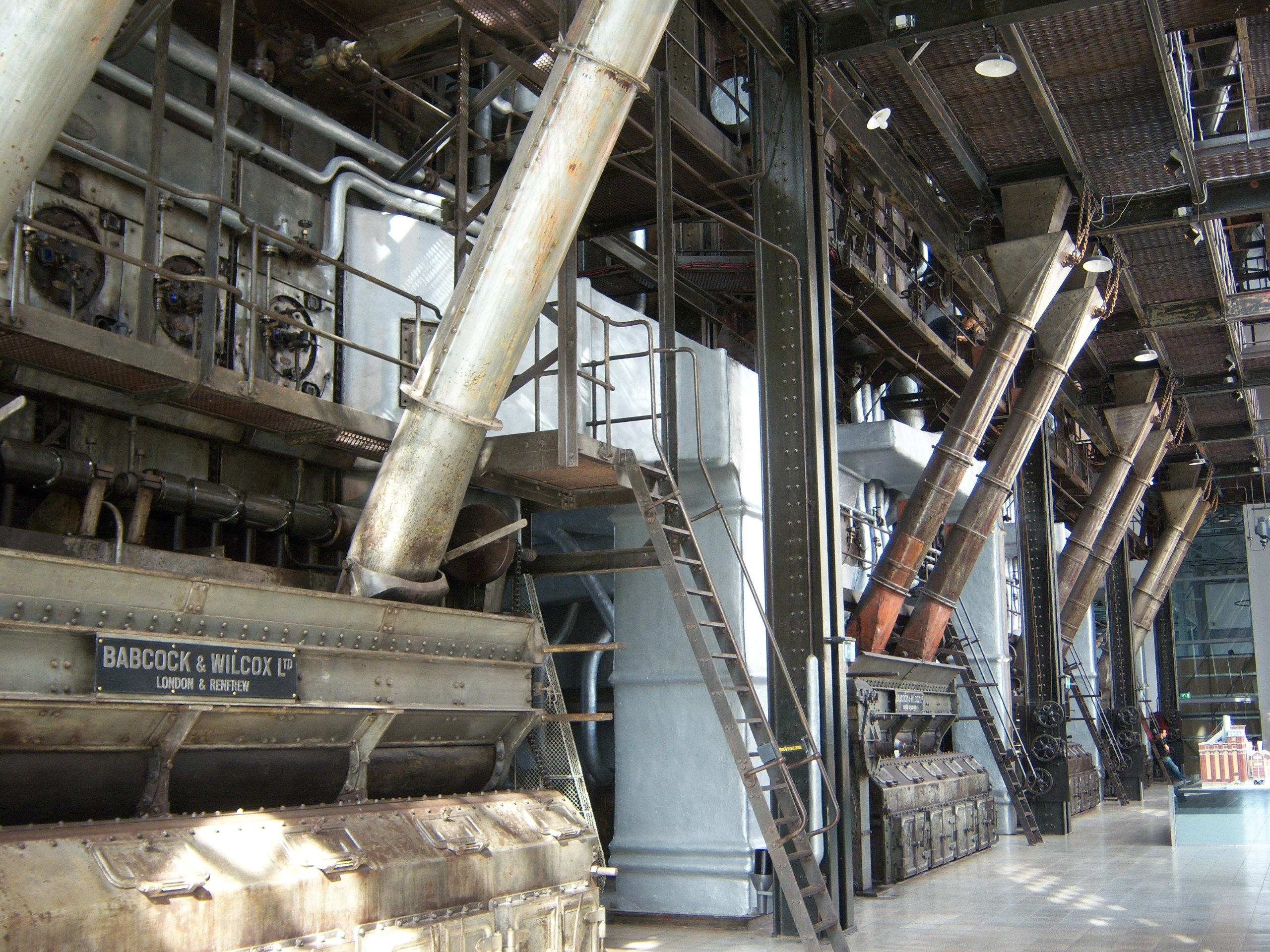 Caldeiras de Alta Pressão da Central Tejo, instaladas em 1940.